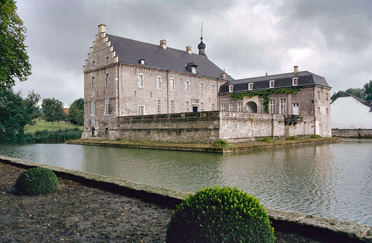 Kasteel Genhoes: Overzicht met omgrachting